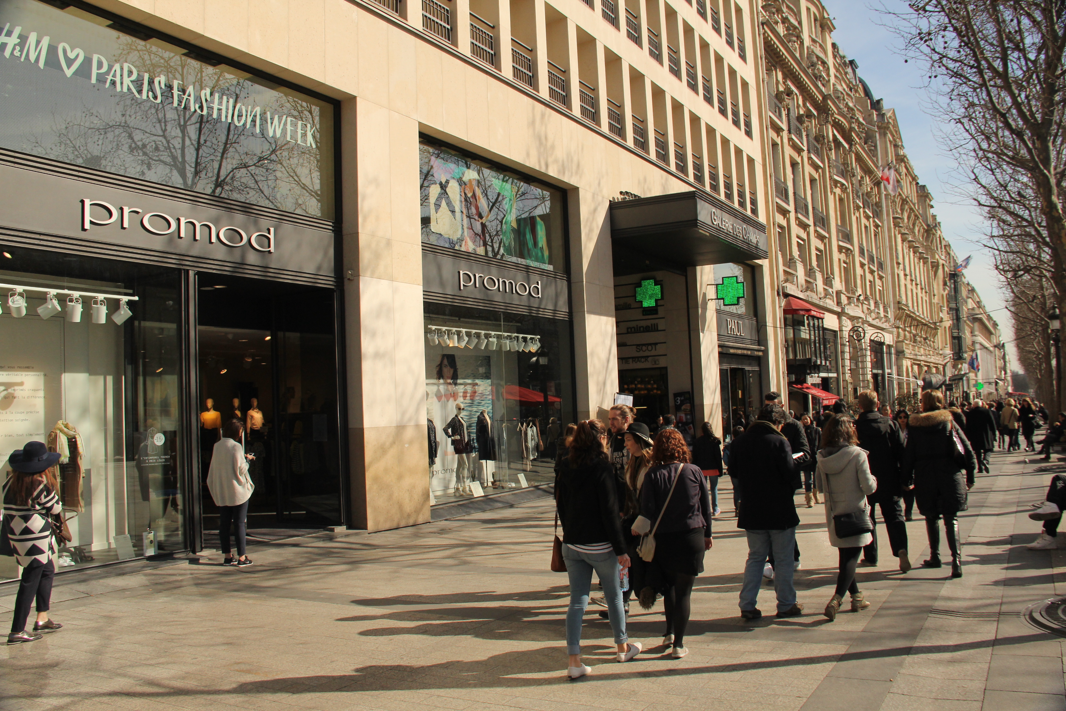 Promod, 86 Avenue des Champs-Élysées, 75008 Paris, Pháp